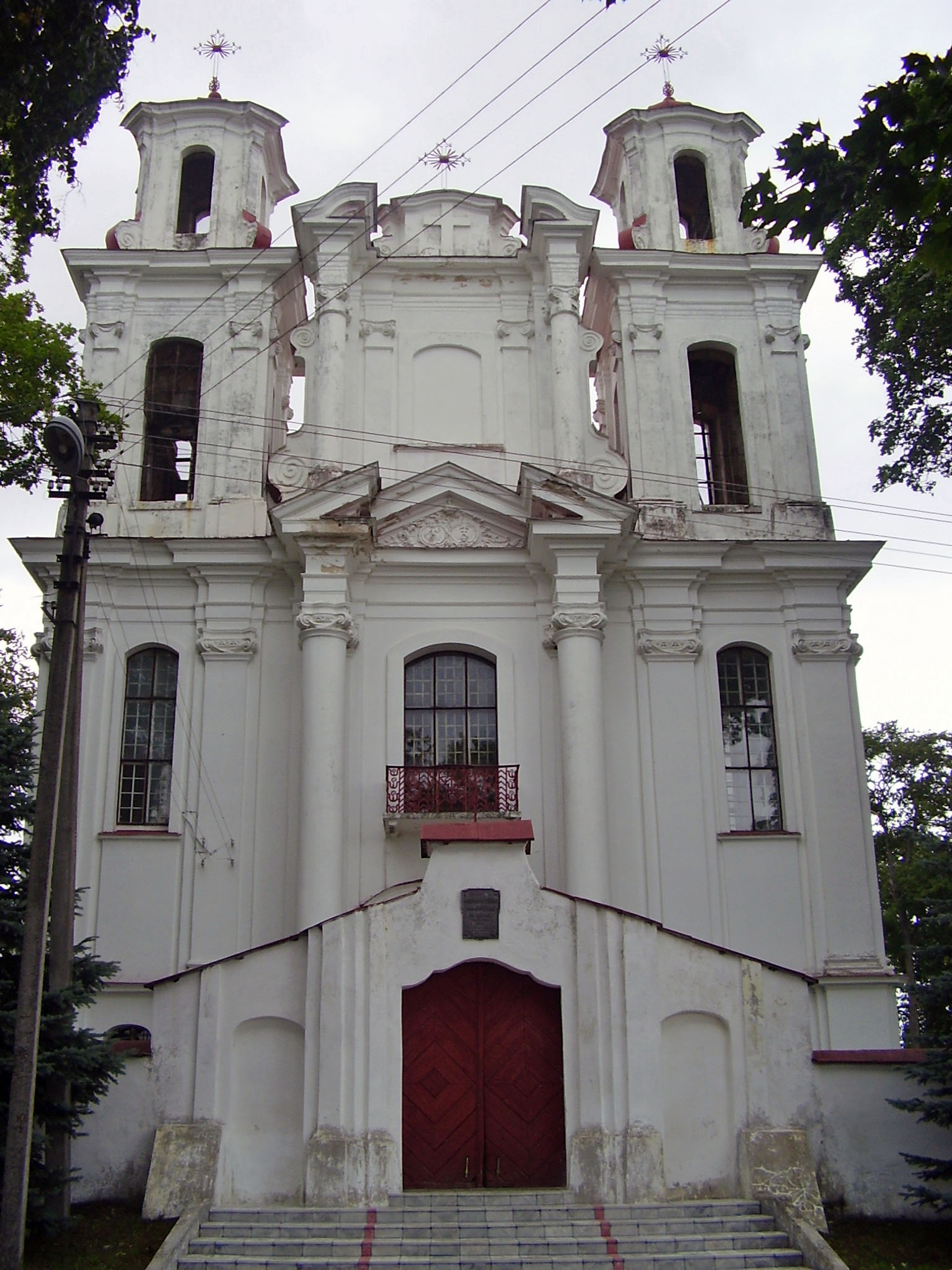 Mano daryta nuotrauka. Foto: amonas, 2006 m. rugpjūčio 12 d.